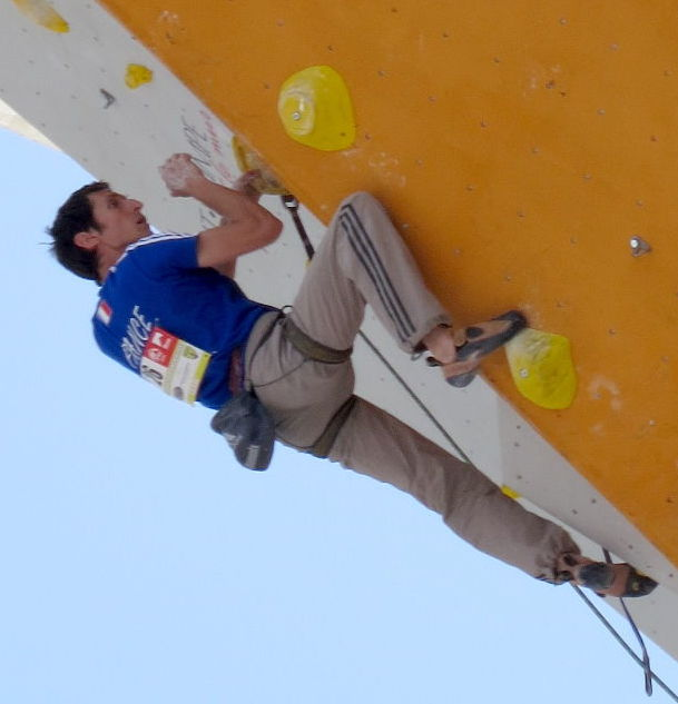 Romain Desgranges en demi-finale du championnat d'Europe d'escalade (difficulté) 2013 à Chamonix